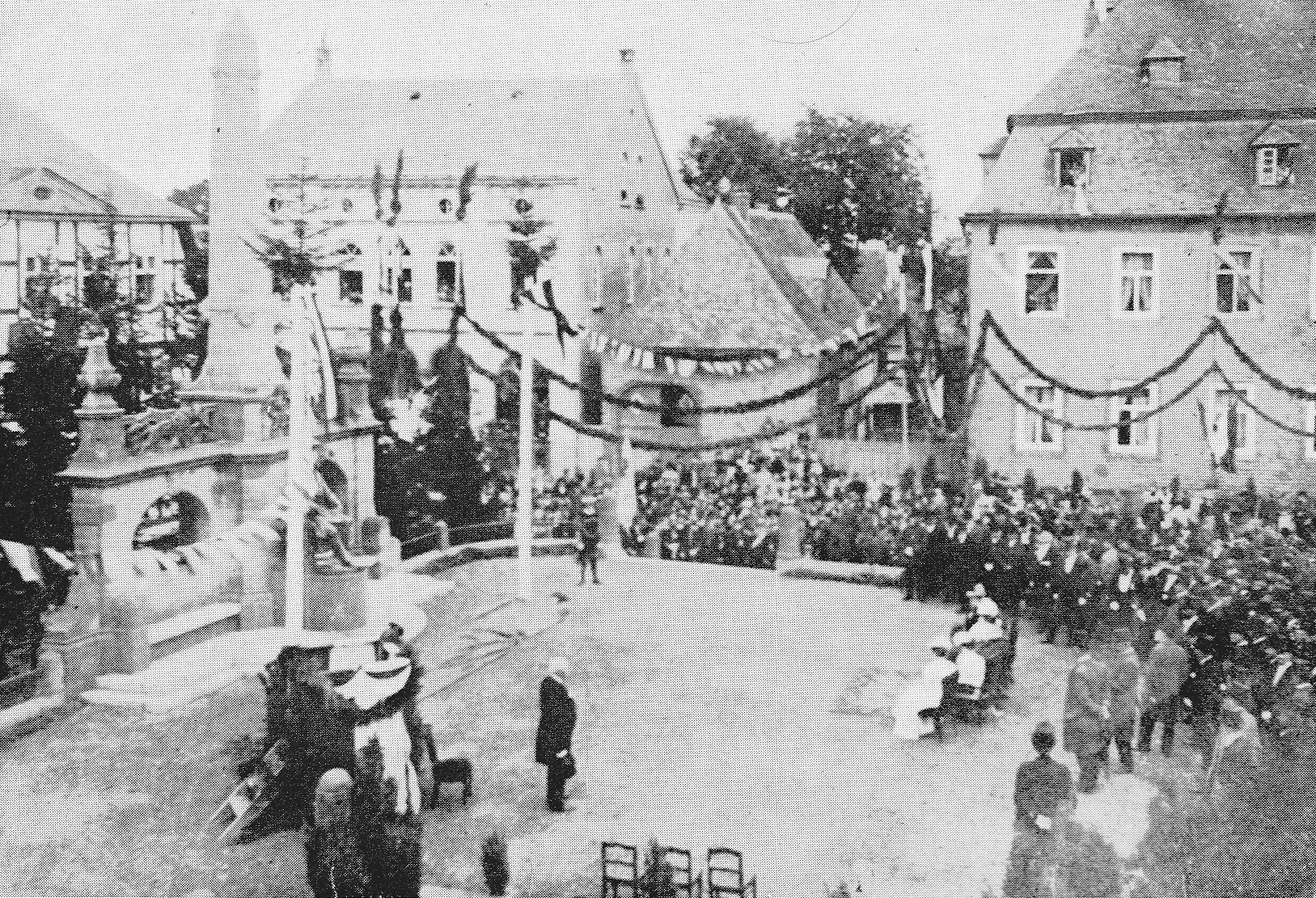 Enthüllung des Papedenkmals in Brilon